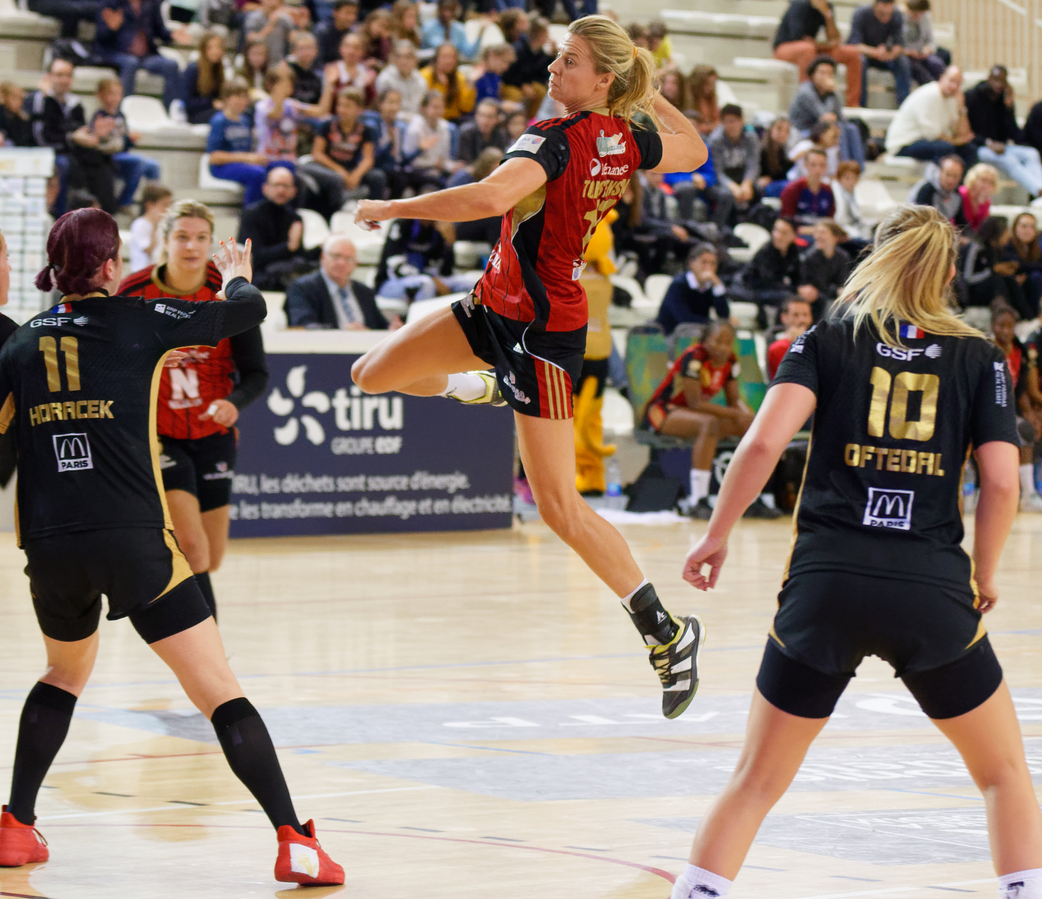 Rencontre Issy Paris Hand / OGC Nice. A Issy Les Moulineaux, le 8 novembre 2017.